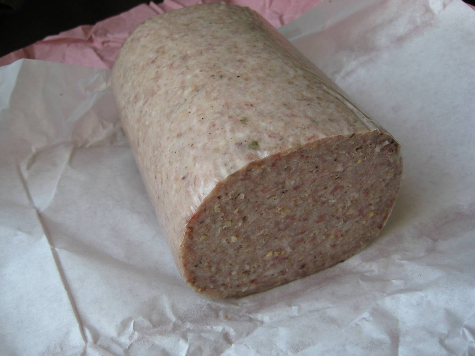 Foto der Speise Knipp, roh